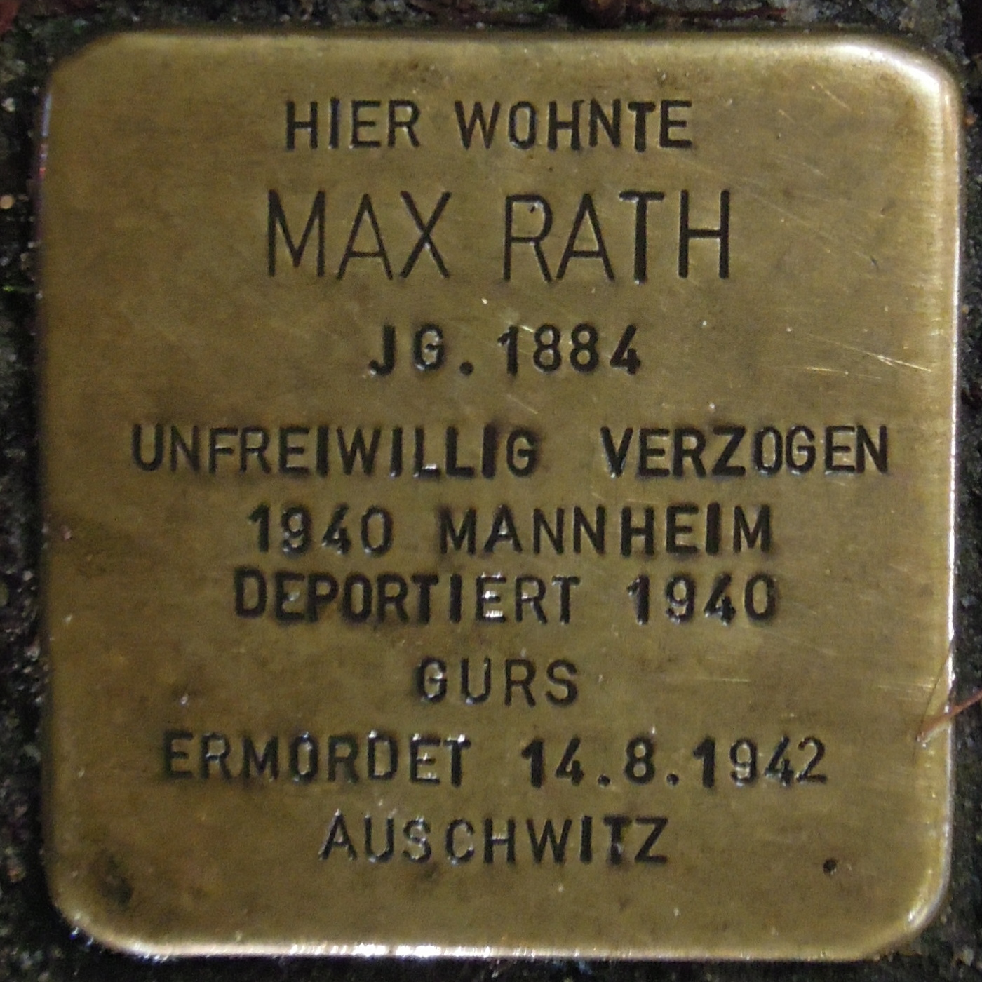 Stolperstein Geldern Bahnhofstraße 9 Max Rath